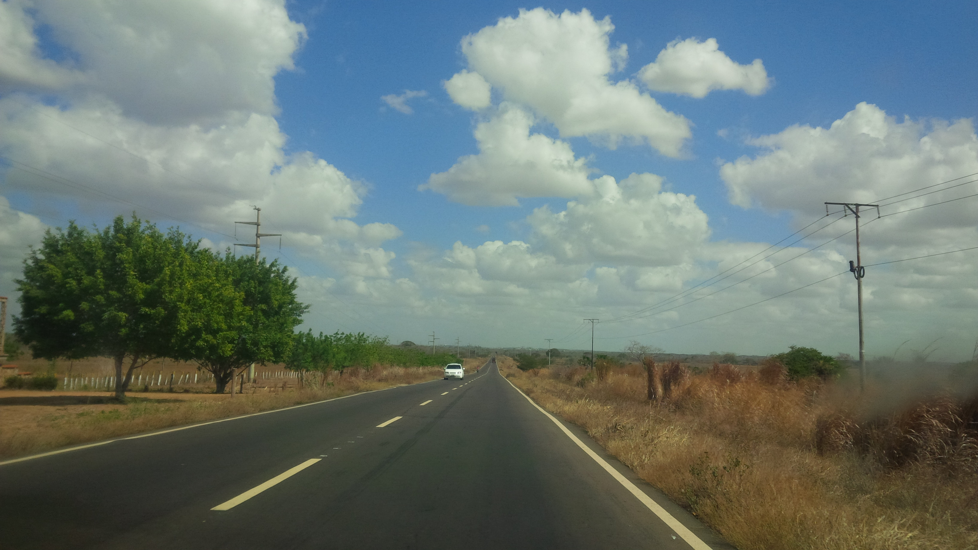 Llegando a VDLP